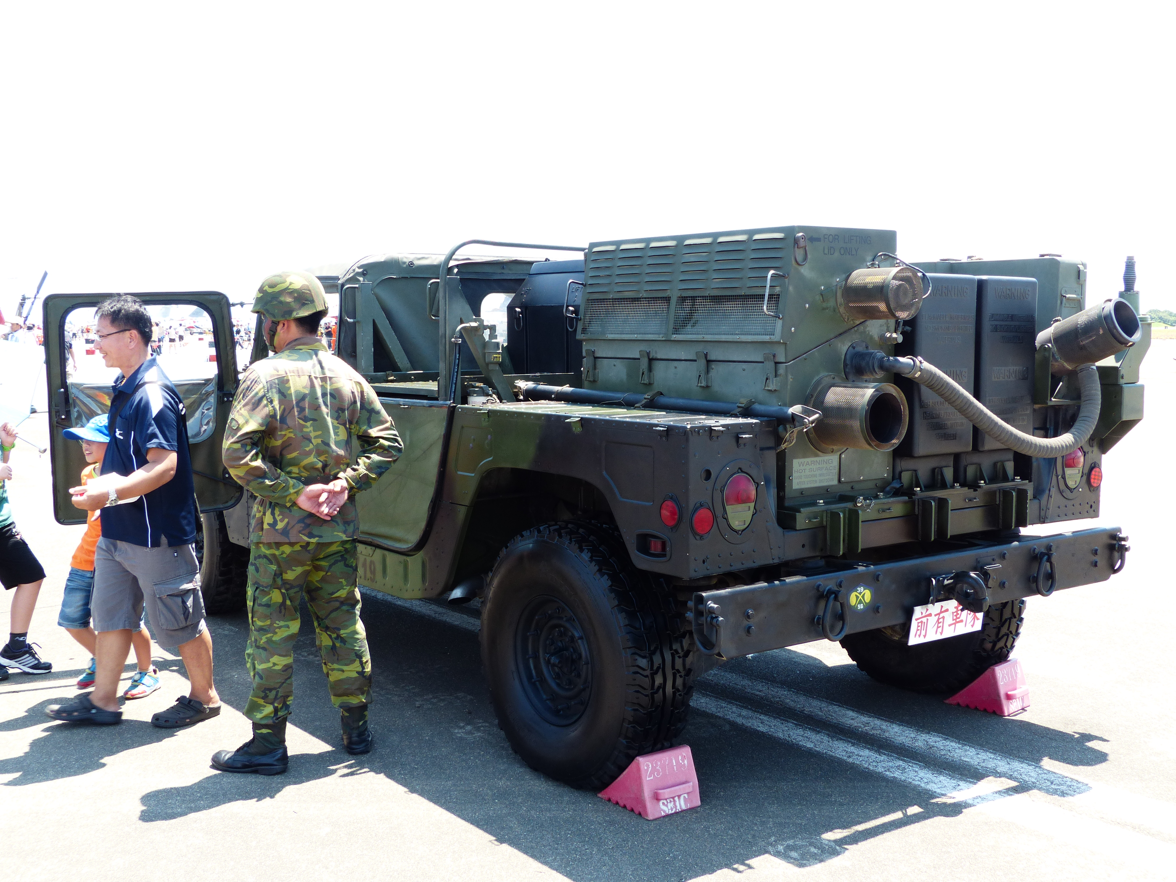 2013年空軍臺南基地營區開放活動，停機坪靜態展示的陸軍M56渦輪發煙車。父子入車內試乘後，離開駕駛艙。